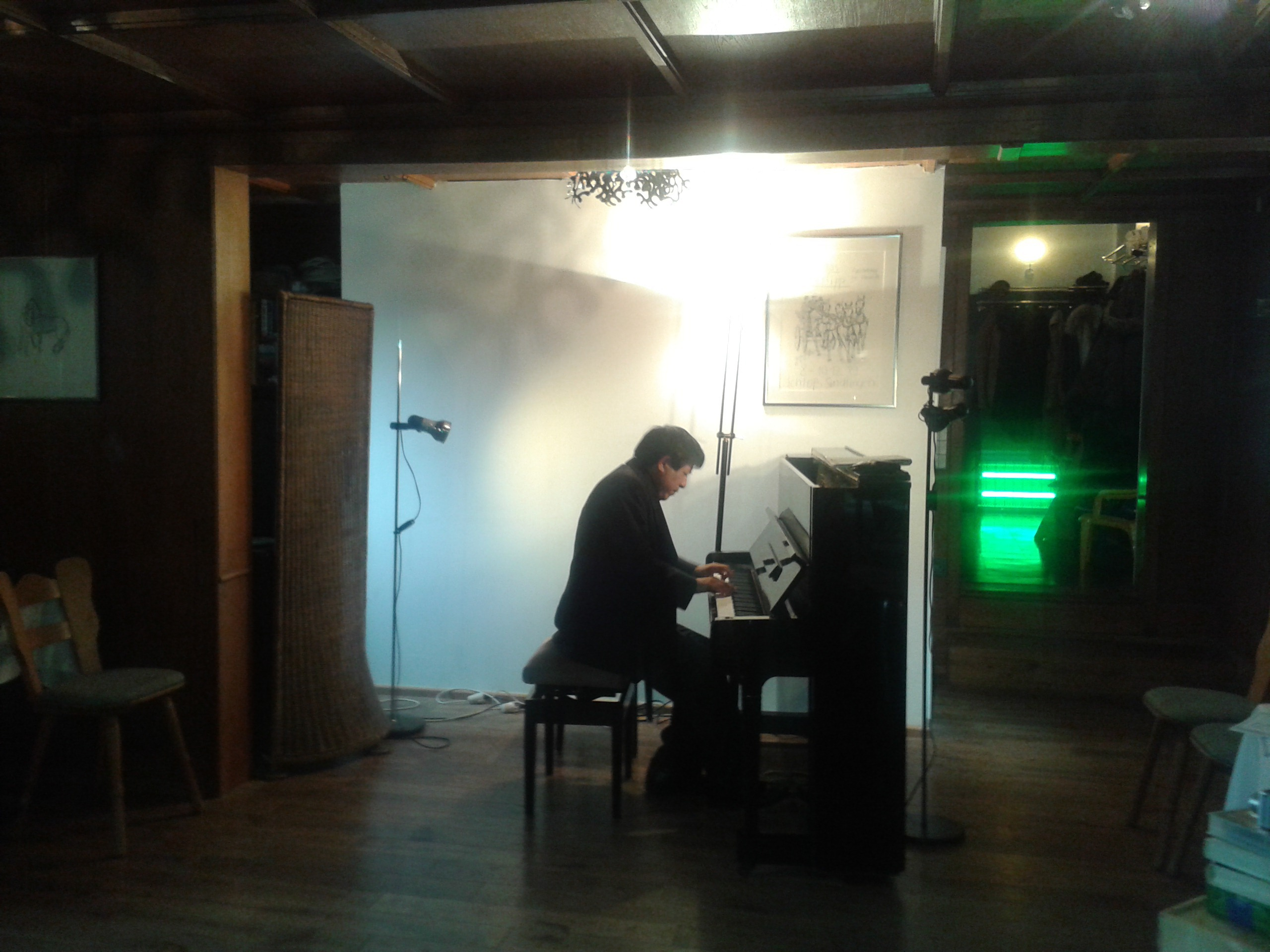 Vladimir Valdivia bei einem Konzert auf Reiterhof-Schloss Sindlingen